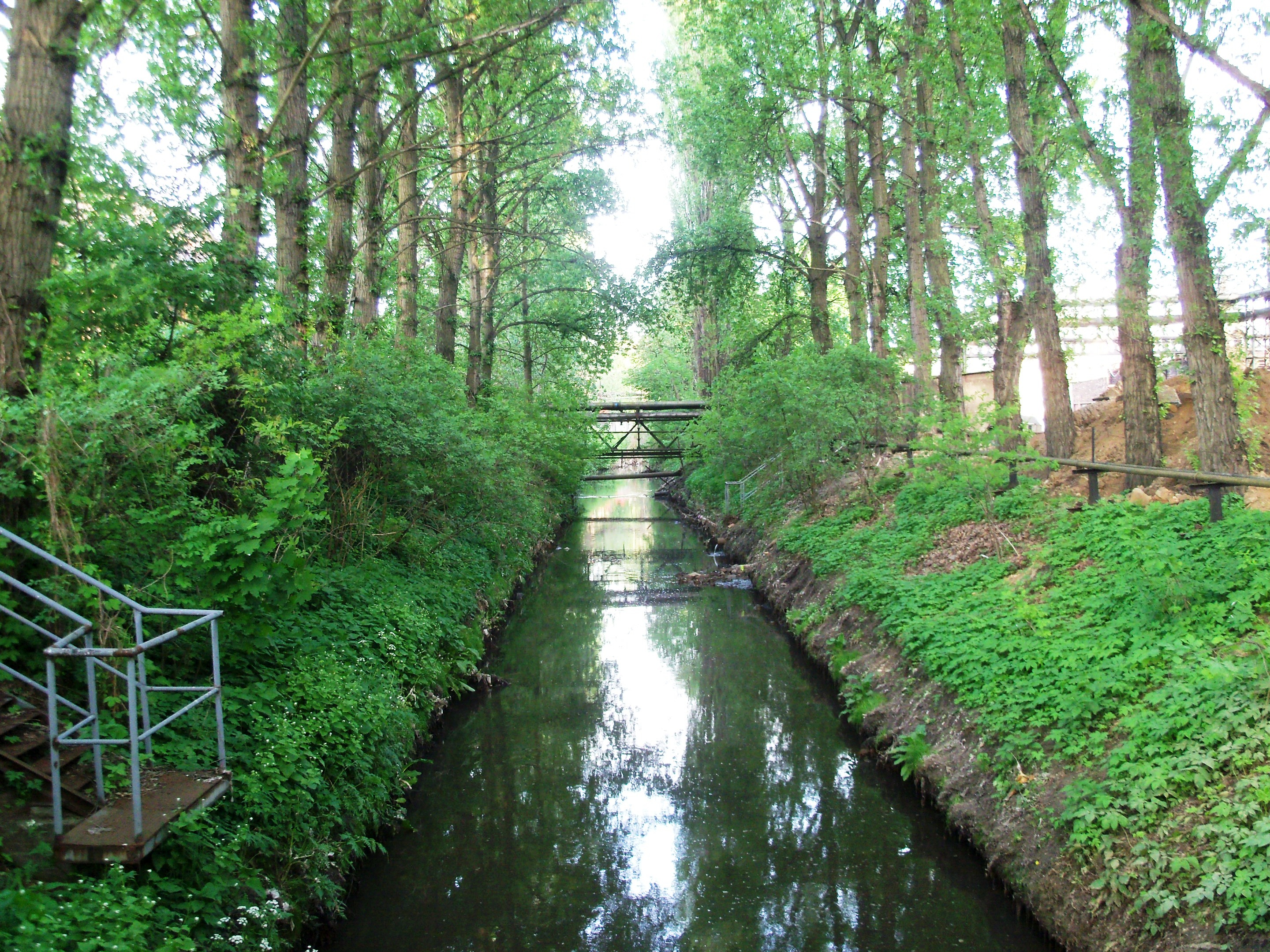 Huta Baildon w Katowicach